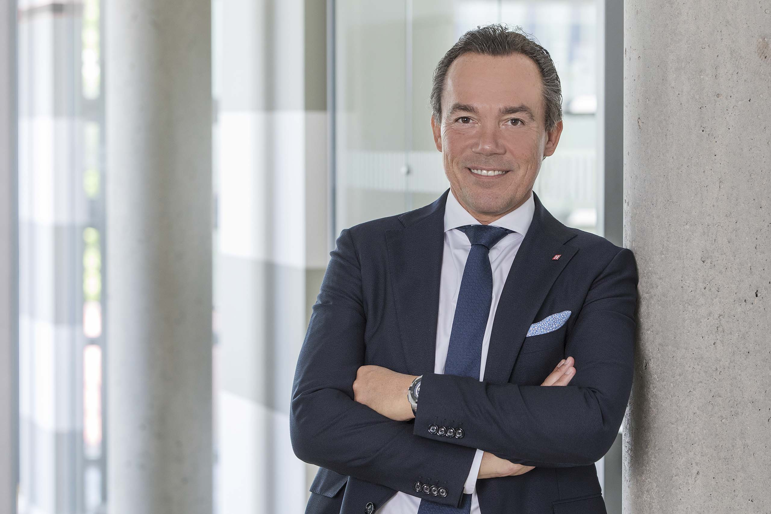 Thomas Hagedorn, Unternehmensgründer, Startup-Förderer